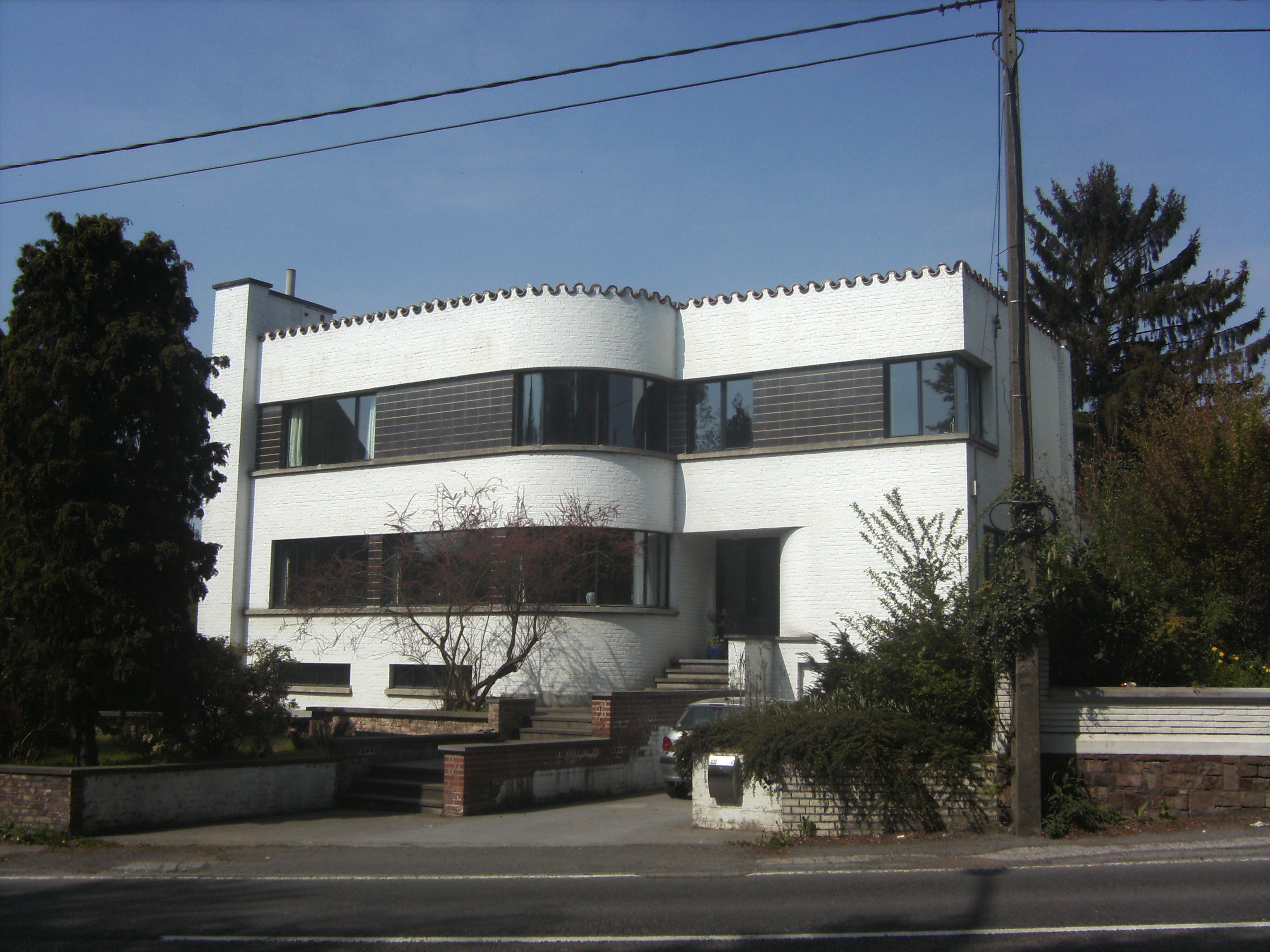 Mont-sur-Marchienne (Charleroi - Belgique) - Villa Darville, rue de Bomerée, 132 - construction vers 1935 - architecte Marcel Leborgne